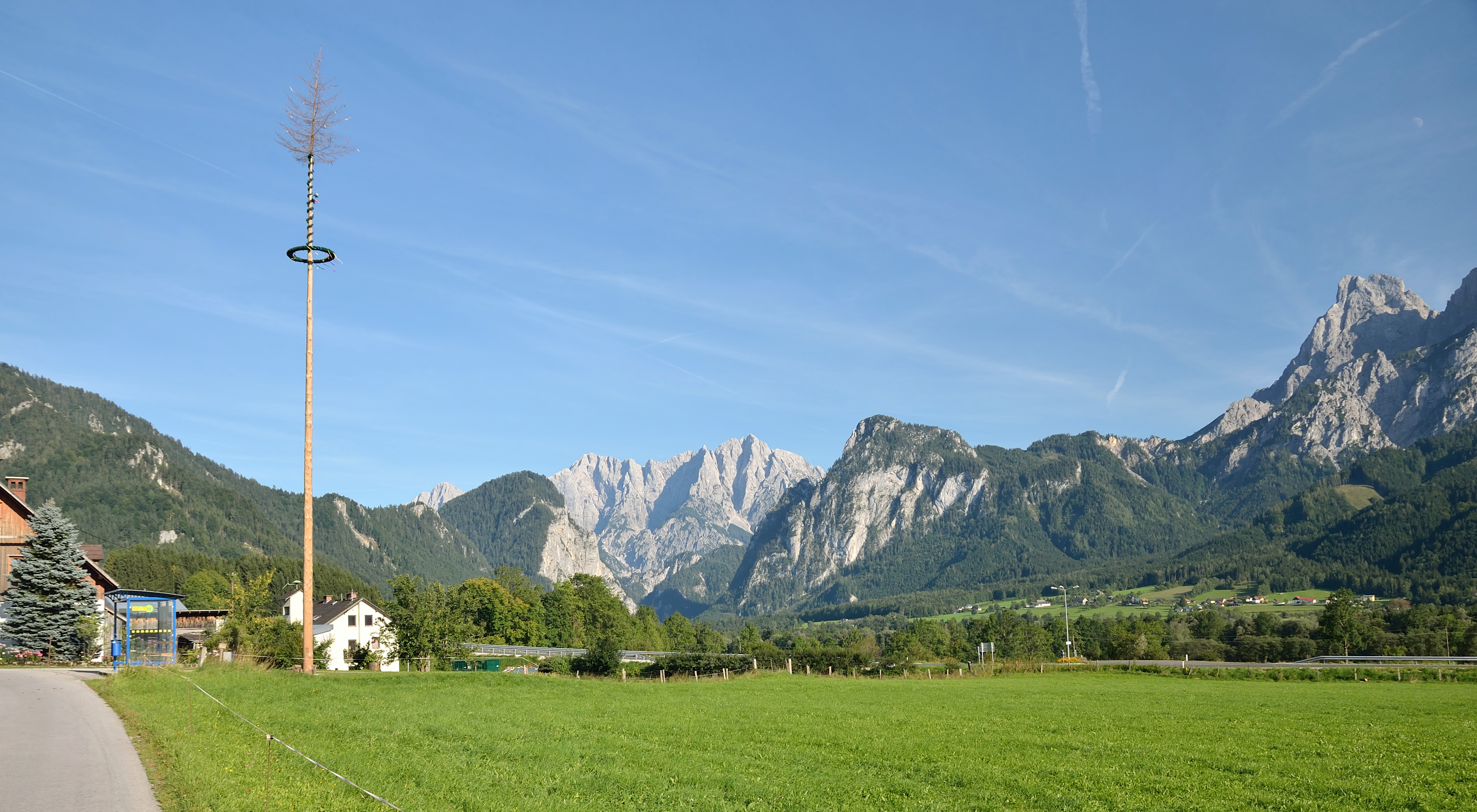 Maibaum und Gesäuseeingang, Weng im Gesäuse. Dahinter ebendieses.